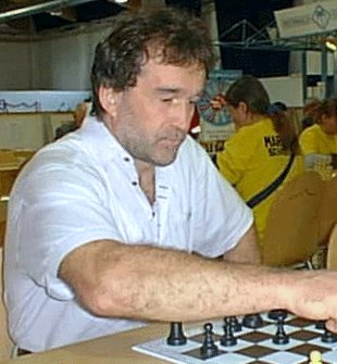 Schlagersänger Chris Wolff besuchte den Schachstand auf der Moselland-Ausstellung 2001 in Trier.